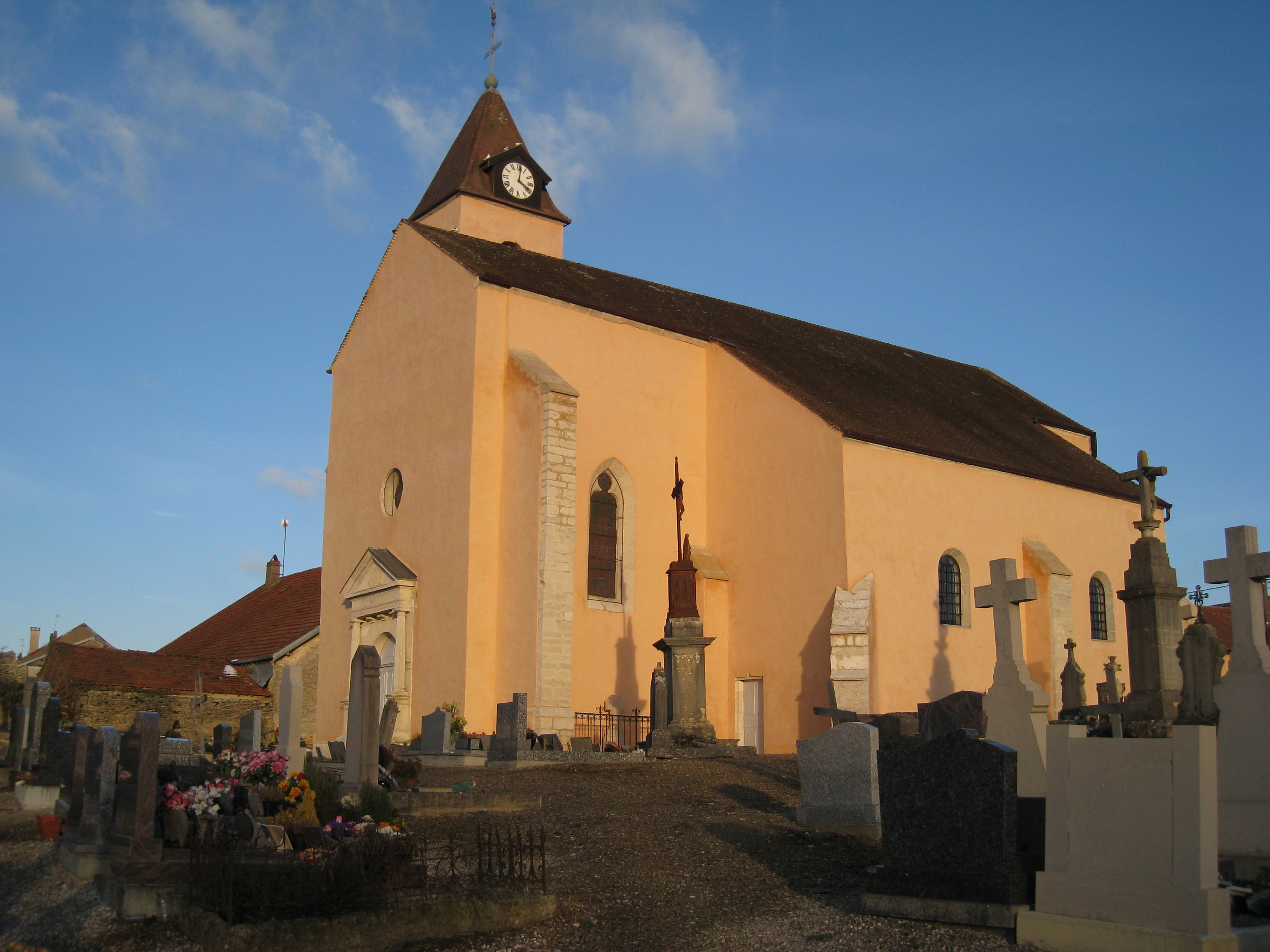 Vue générale de l'église